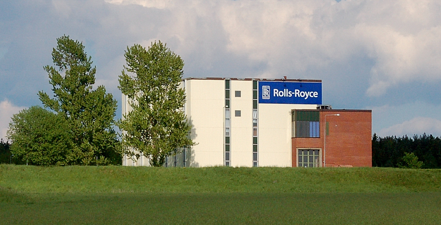 Rolls-Royce industriplant i Kristinehamn Sweden